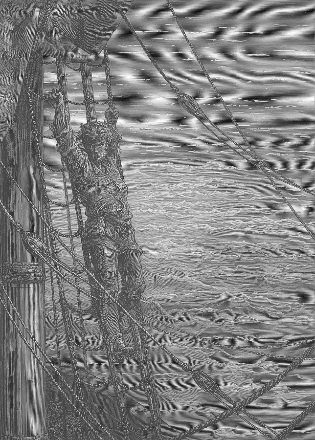 Illustration zu Coleridges "Rhyme of the Ancient Mariner"